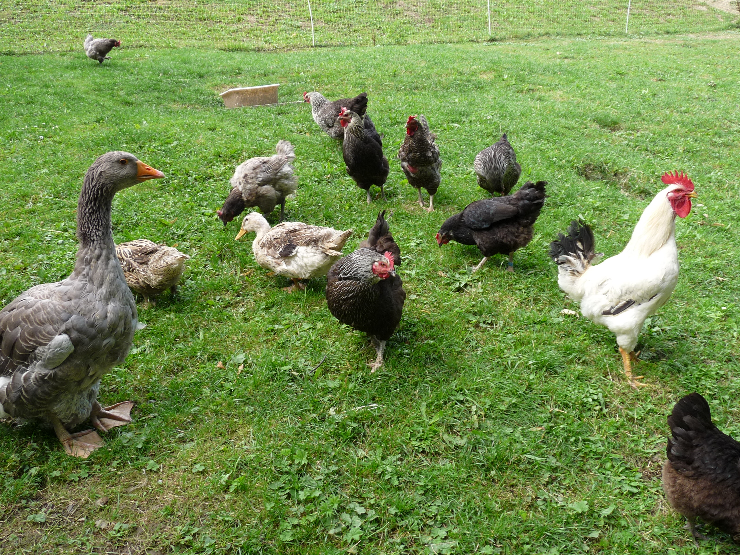 Plusieurs volailles.